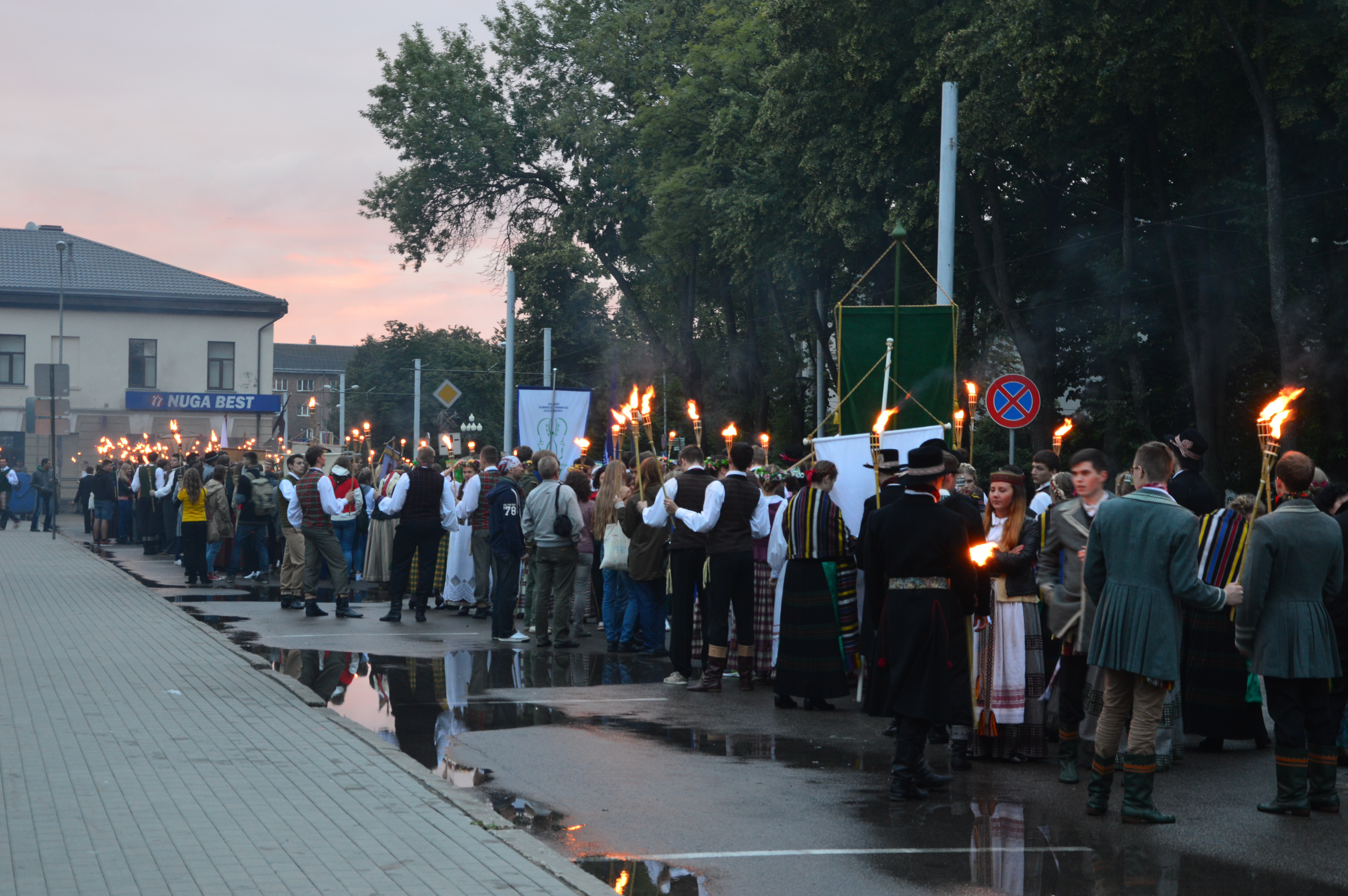 Gaudeamuse rongkäik Daugavpilsis.